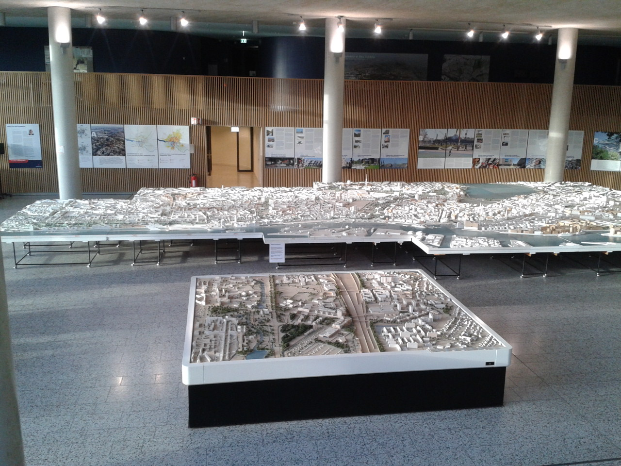 Stadtmodell von Hamburg, in der Eingangshalle der Behörde für Stadtentwicklung und Umwelt, Neuenfelder Str. 19